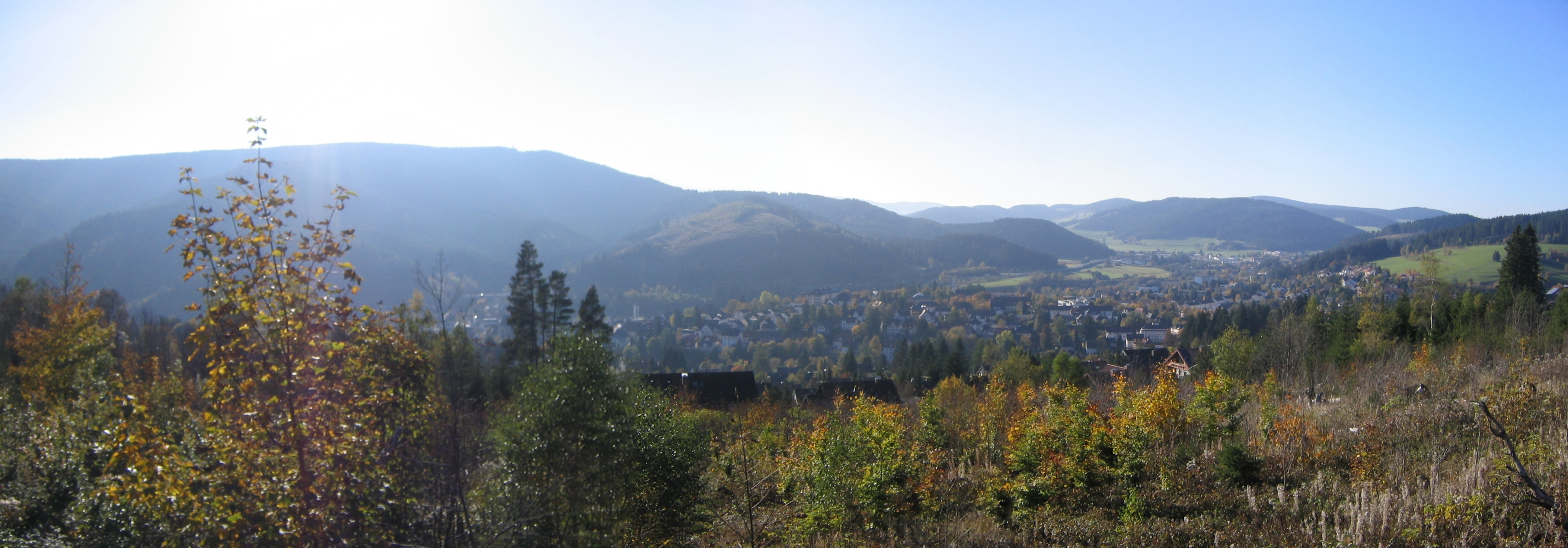 Blick über Neustadt (Titisee-Neustadt, Deutschland) This panoramic image was created with Autostitch (stitched images may differ from reality).